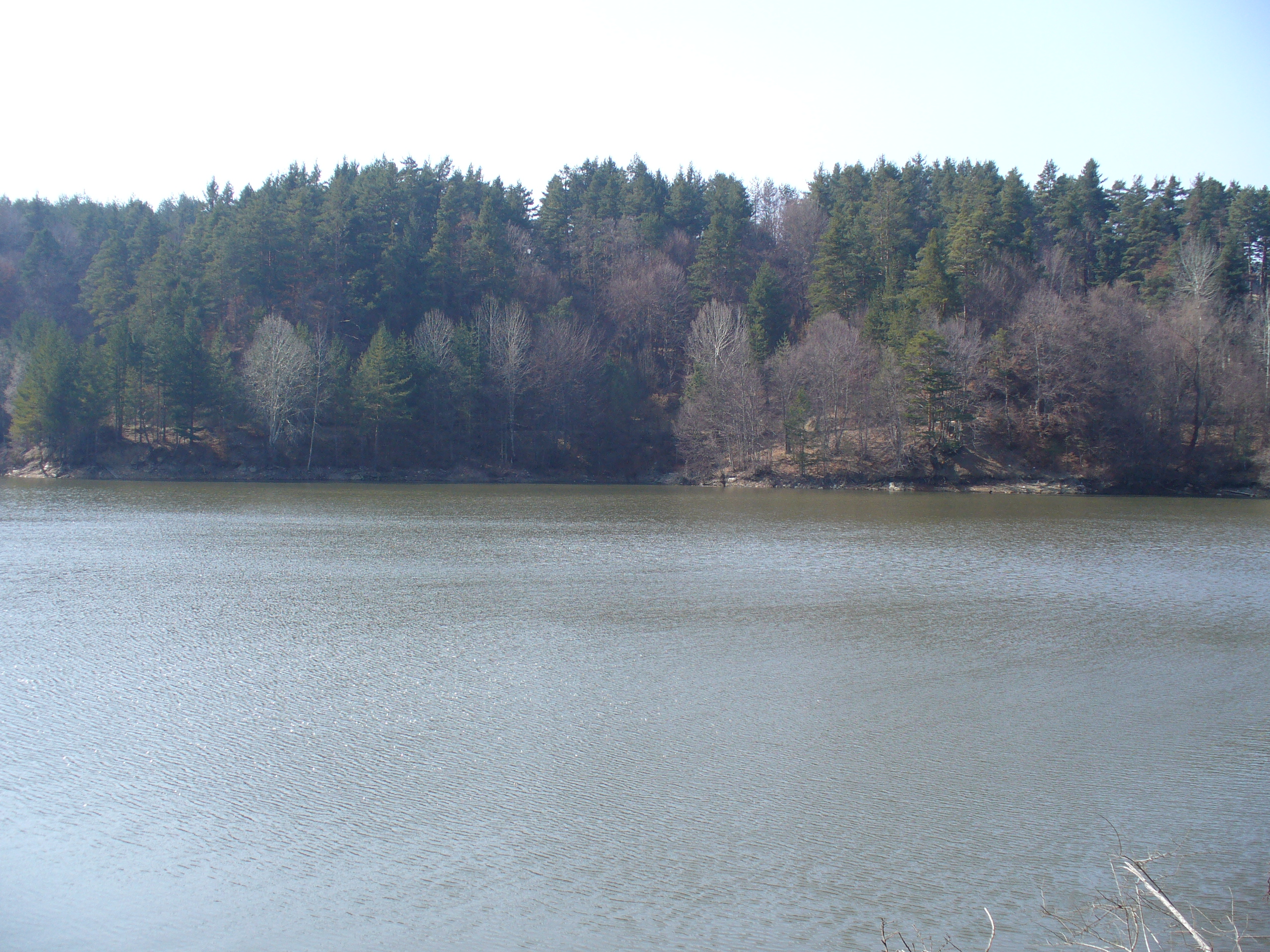 Berovo Lake, Macedonia